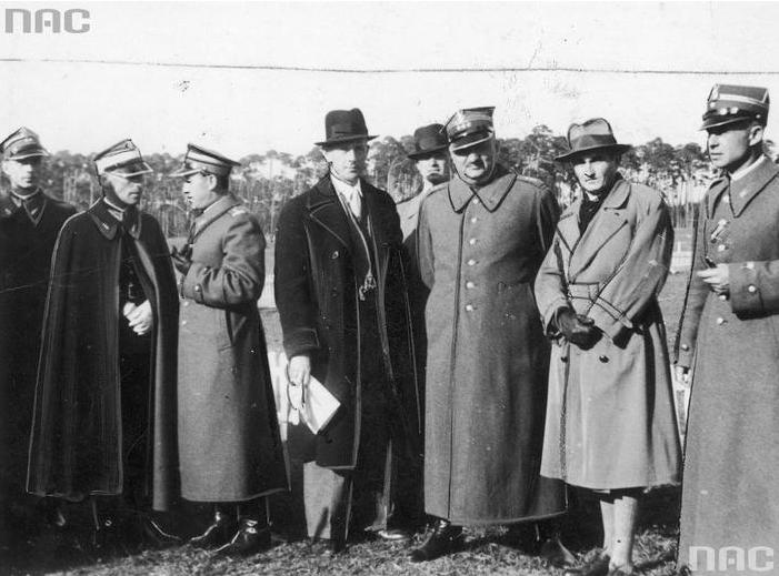 VIII Jeździeckie Mistrzostwa Polski w Bydgoszczy. Grupa uczestników i organizatorów zawodów jeździeckich. Widoczni m.in.: porucznik Tadeusz Gerlecki, rotmistrz Sitek, major Adam Królikiewicz, rotmistrz Leon Kon, sekretarz generalny Polskiego Związku Jeździeckiego Szopa, pułkownik Zakrzewski, rotmistrz Grzegorz Romaszkan, major Janusz Kapuściński.